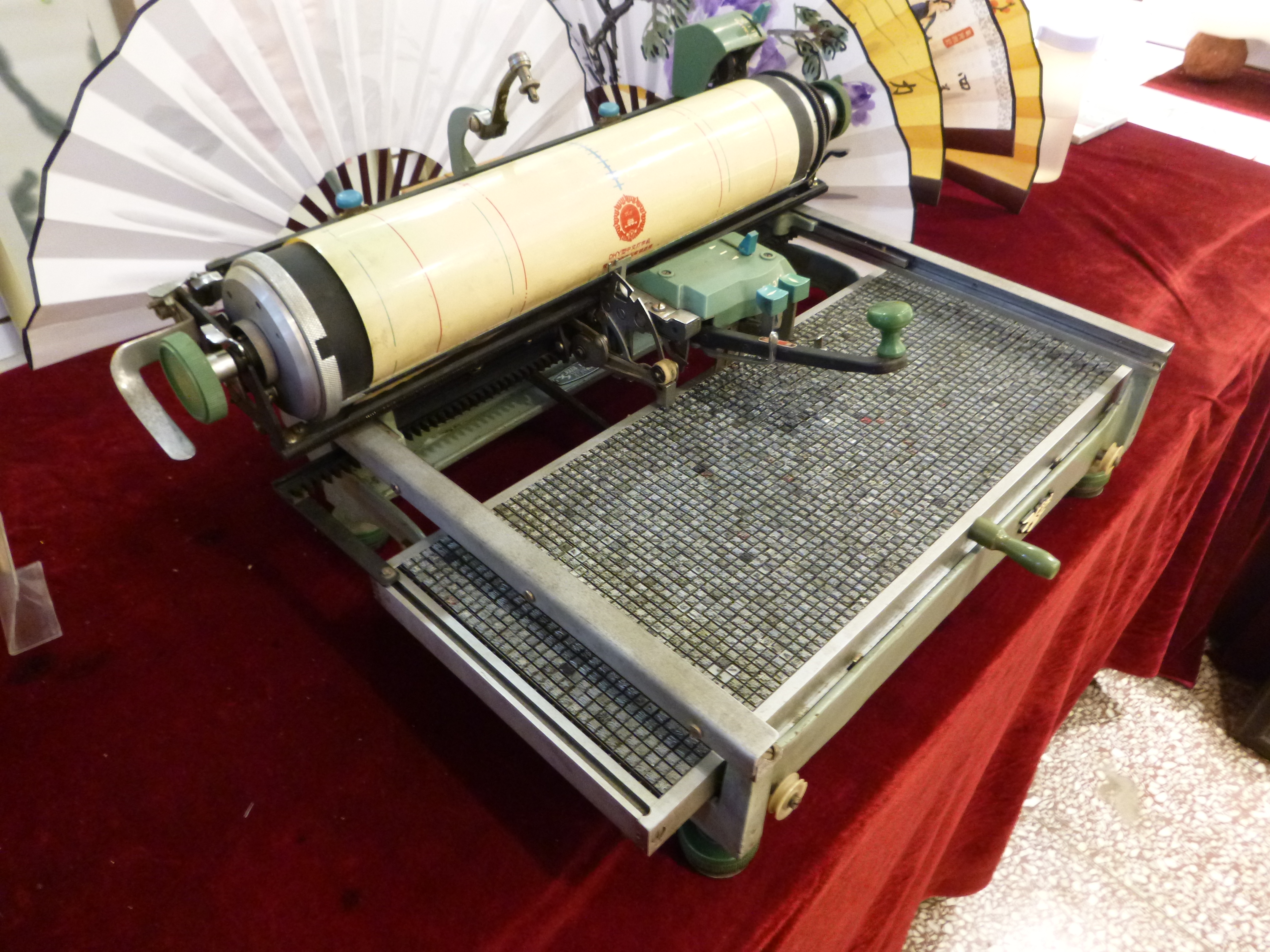 mechanische chinesische Schreibmaschine, gesehen in Xi'an